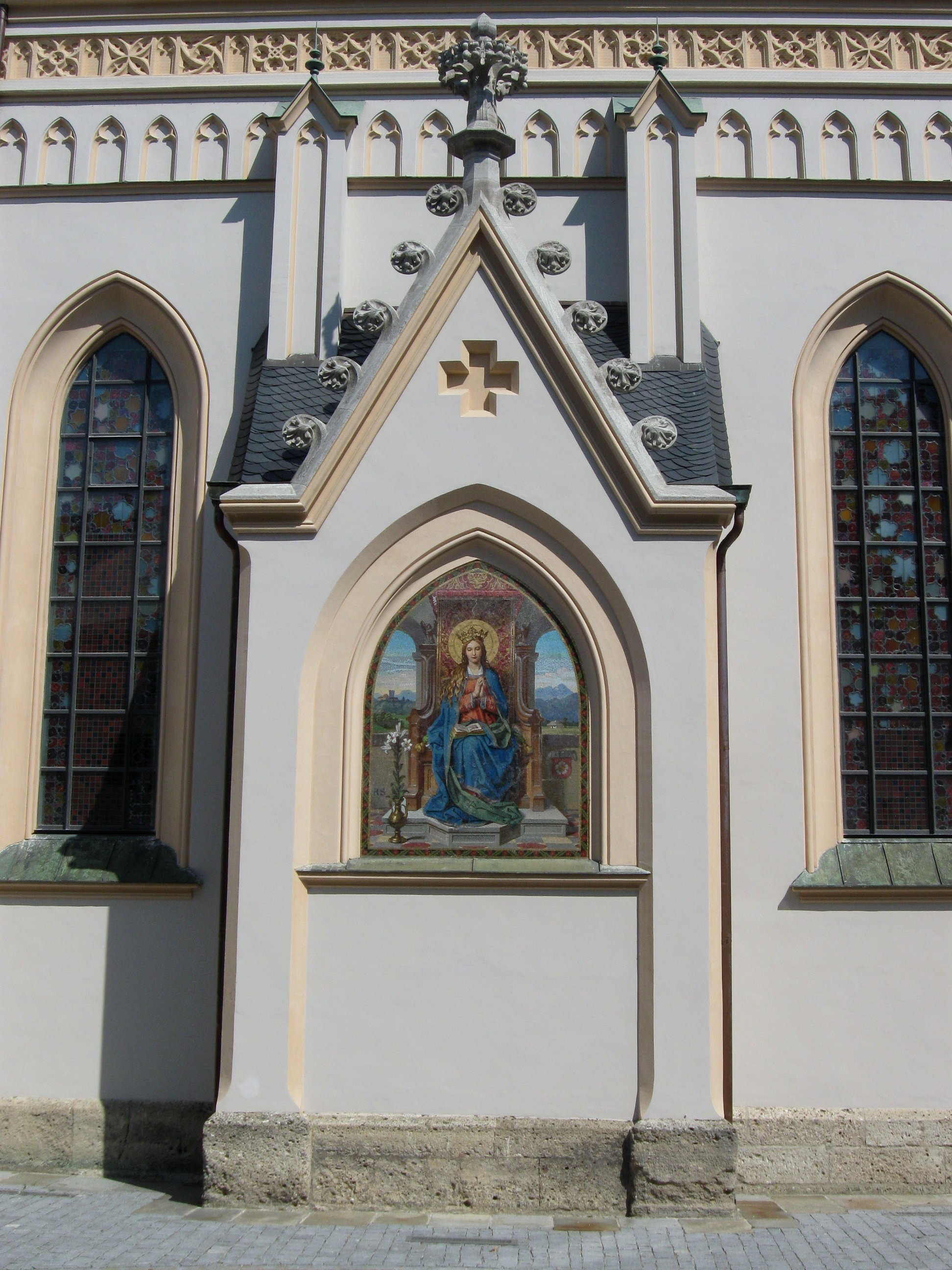 Ludwigsplatz 1; Kath. Stadtpfarrkirche St. Nikolaus, 2. Hälfte 15. Jh., 1880/82 Regotisierung nach Plänen von Johann Marggraff, München; mit Ausstattung